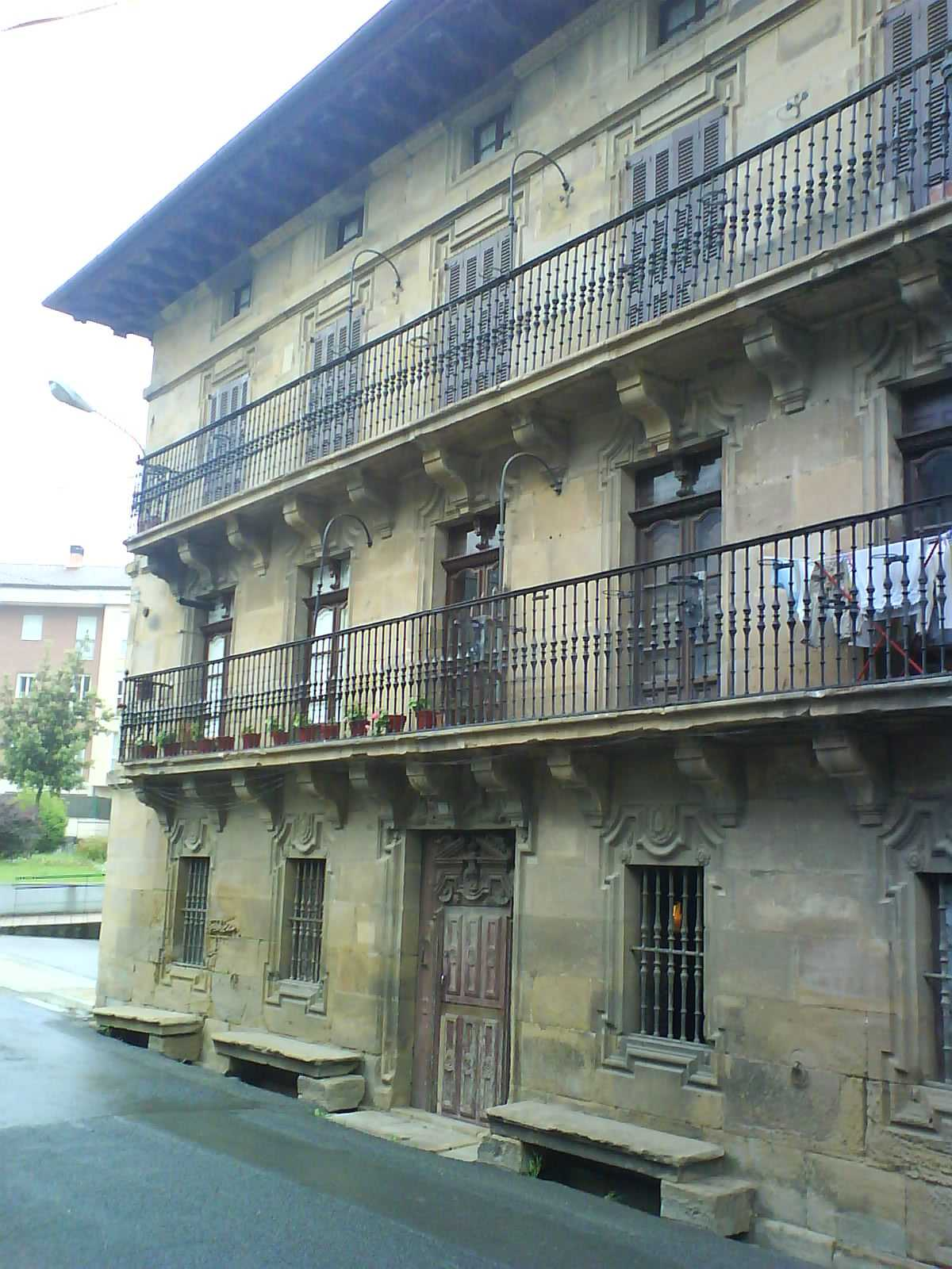 Cegama, Edificio 1. Guipúzcoa, País Vasco (España).